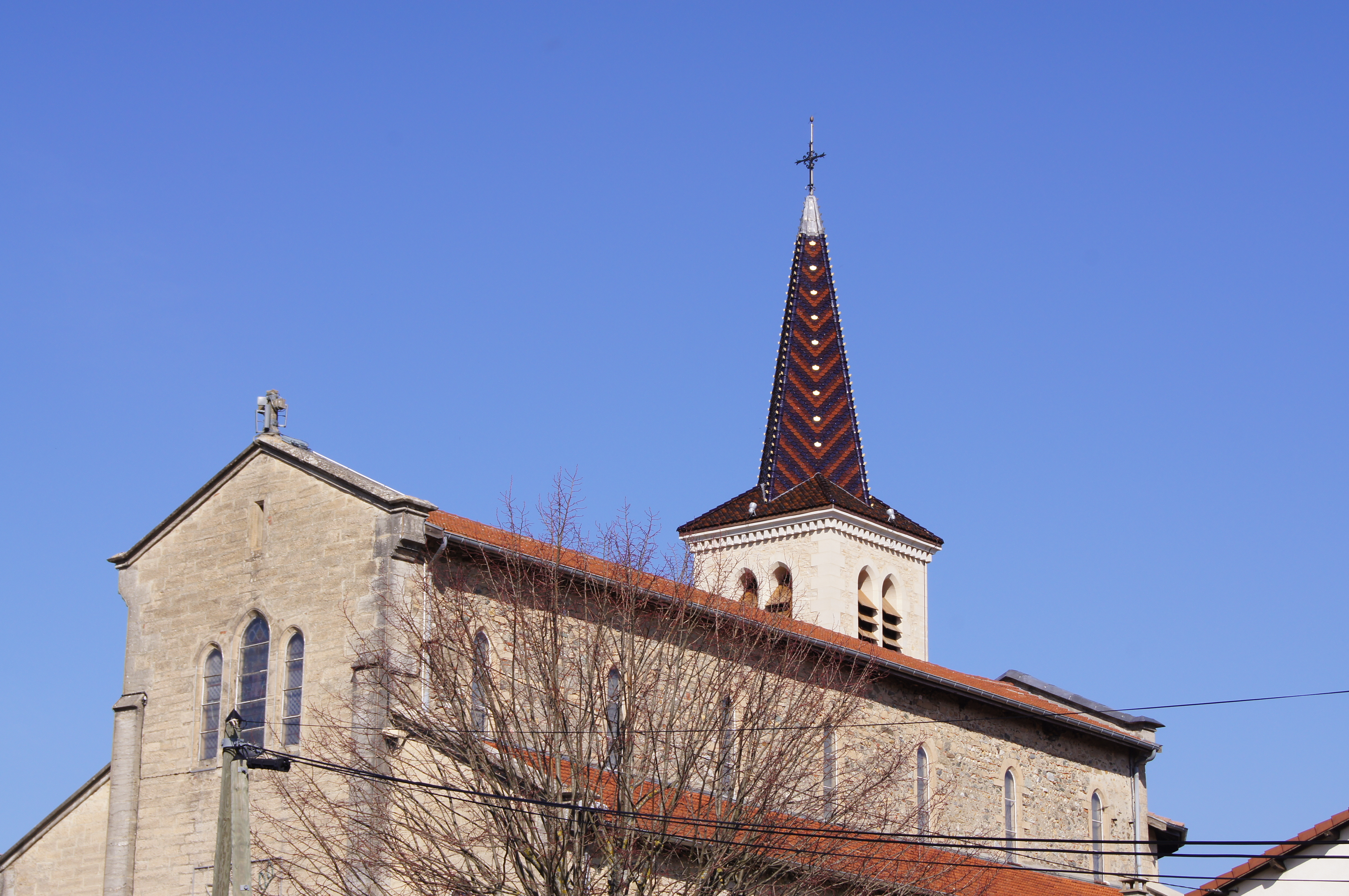 L'église de Badinières en fin de rénovation